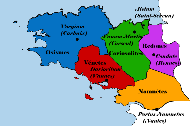 Carte des peuples celtes en armorique